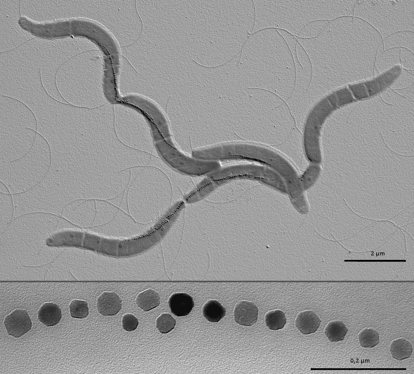 Magnetospirillum gryphiswaldense. Elektronenmikroskopische Aufnahme einiger Zellen mit intrazellulären Ketten aus Magnetitkristallen. Unten: Vergrößerter Ausschnitt einer Kristallkette. Electron micrograph of Magnetospirillum gryphiswaldense cells containing chains of magnetite crystals. Lower image: Magnified section of a crystal chain.